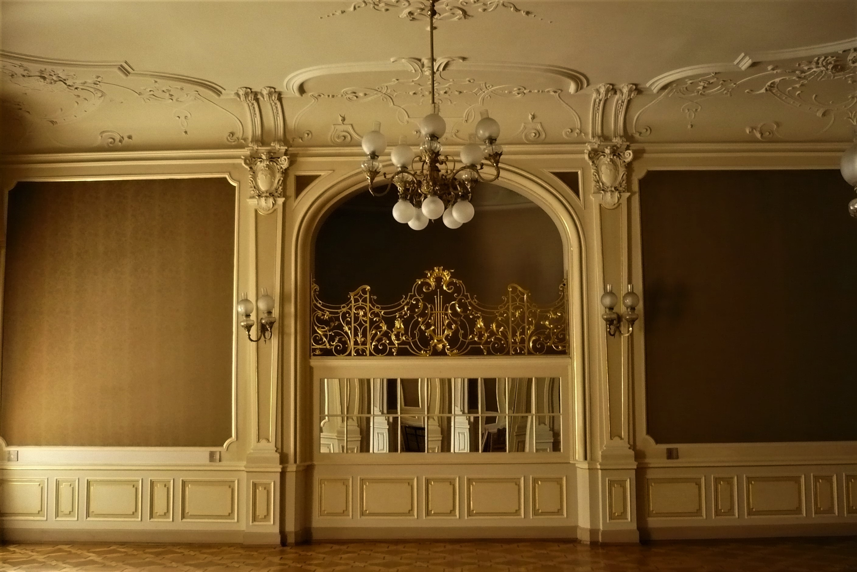 Kasyno Szlacheckie we Lwowie